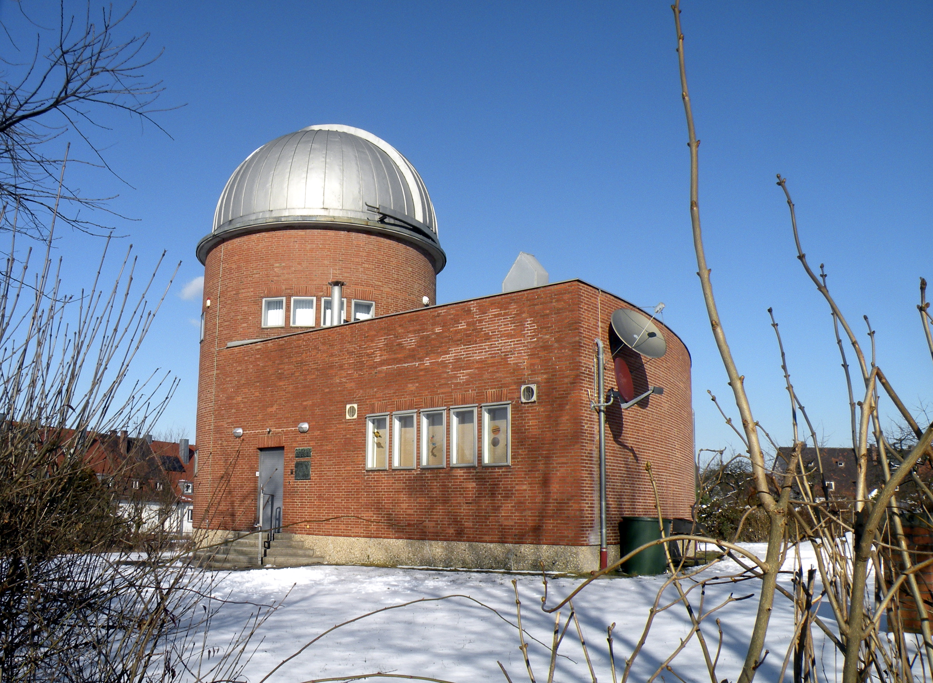 Regiomontanus-Sternwarte in Nürnberg